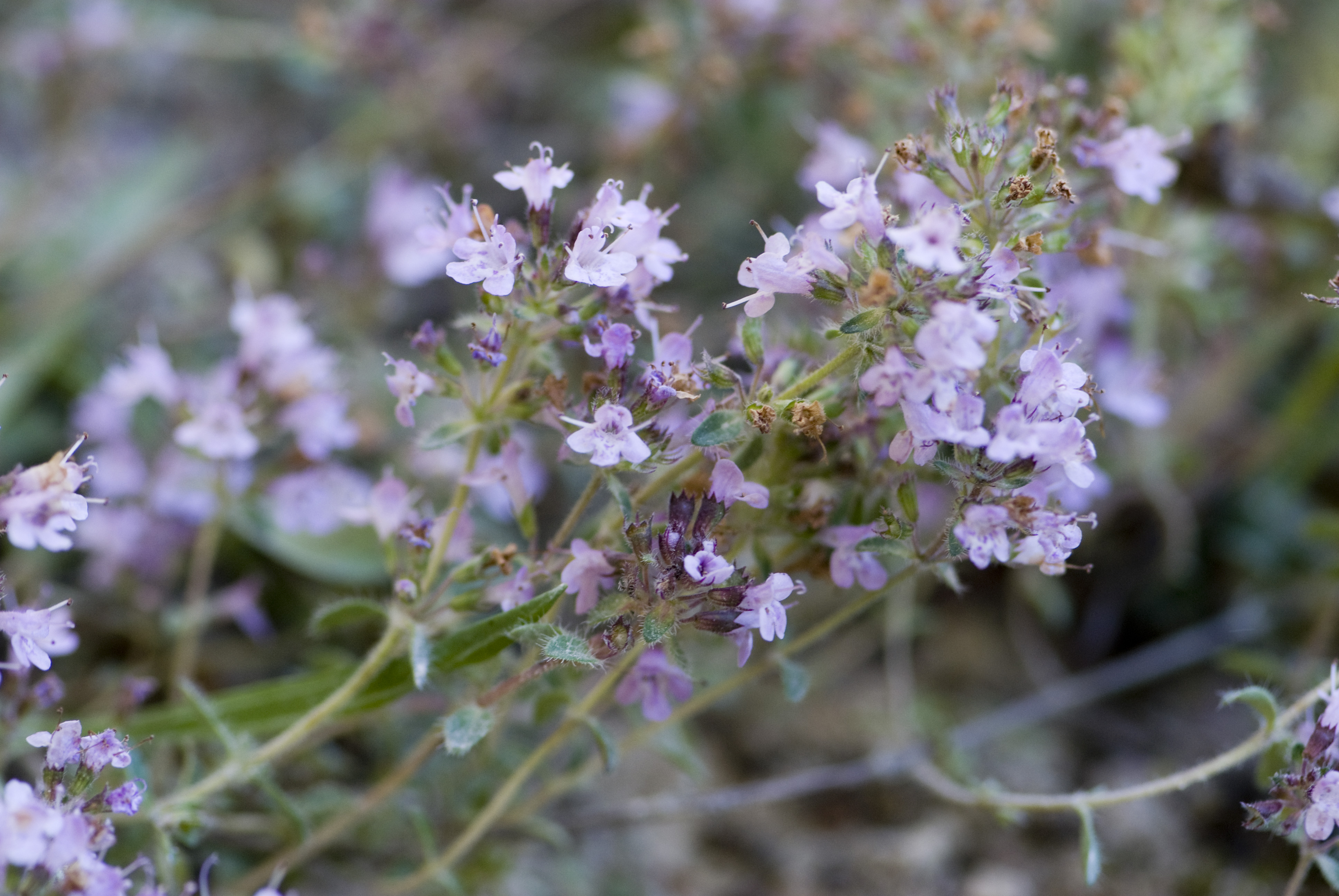 Thymus praecox-subsp-praecox Feuilles ciliées, carrière de Saint-vaast-lès-Mello (Oise), France